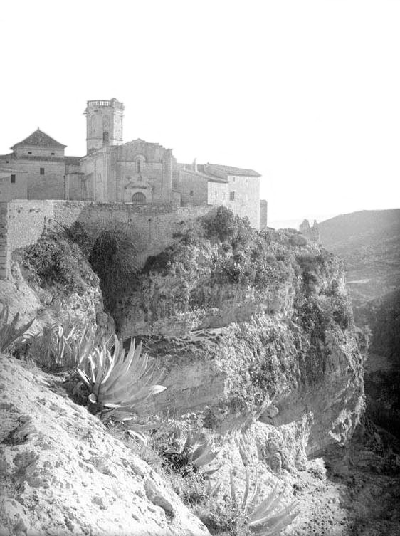 Vista parcial de Sant Martí Sarroca dalt a la muntanya. Enric Ribas i Virgili (Entre 1920 i 1930)